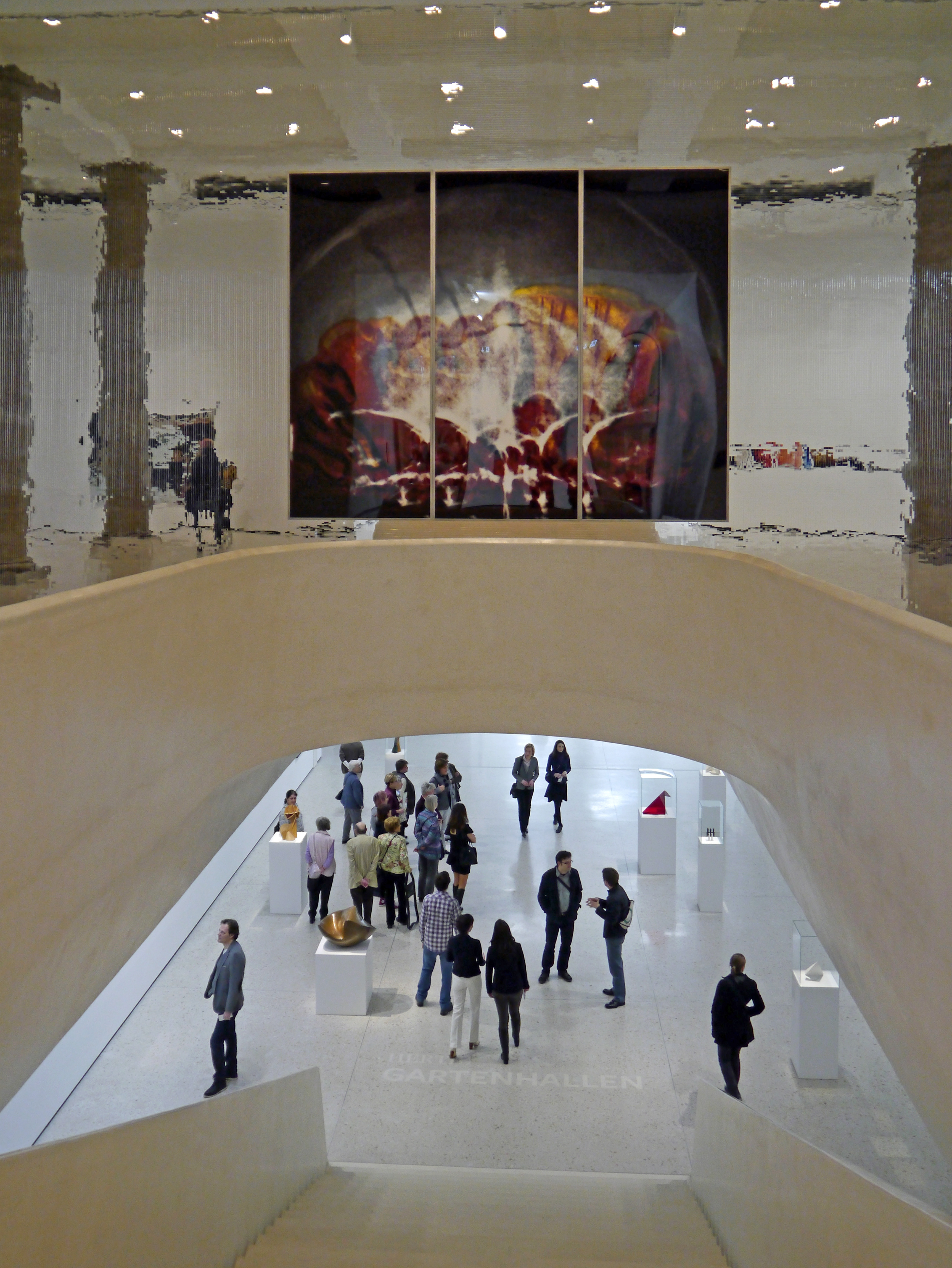 Treppe zum Staedel-Erweiterungsbau, 2012 in Ffm.